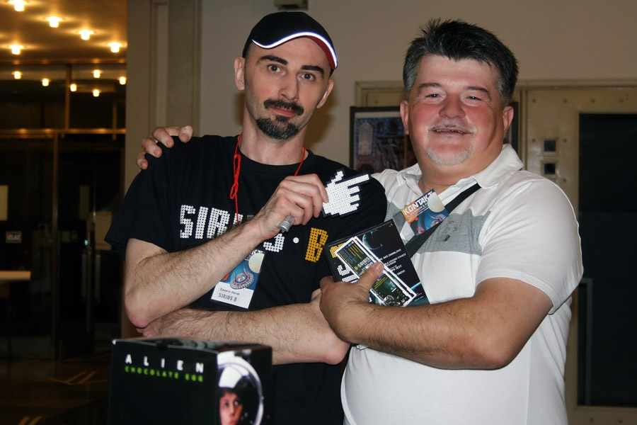 Konvencija Kontakt, koja je spojila 34. SFeraKon i 34. Eurocon u Zagrebu